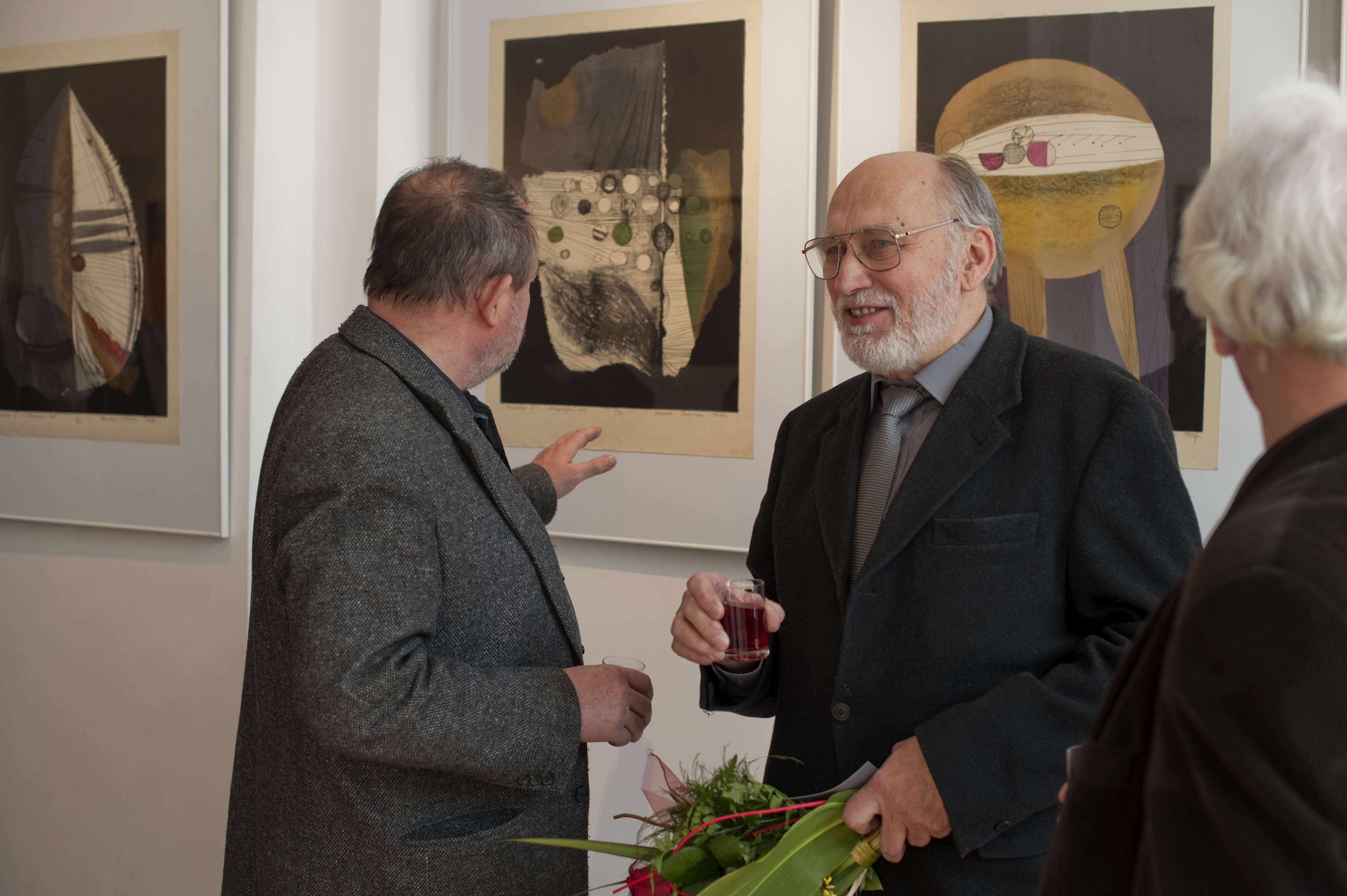 Fotografia z wernisaży indywidualnej wystawy profesora Romana Skowrona pt: "Pozostał owoc" z cyklu Pedagodzy ASP